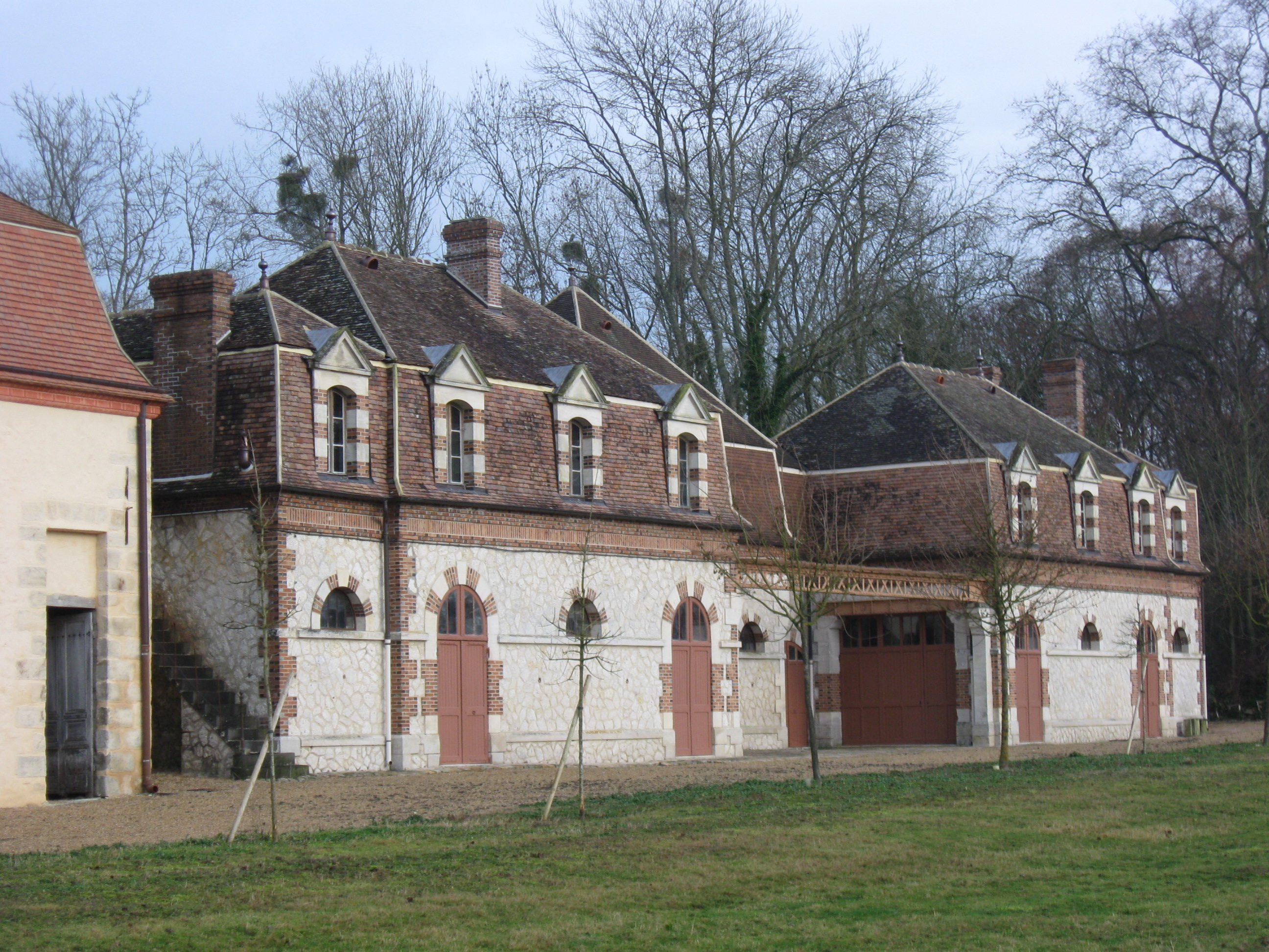 Château de Motteux : communs. (commune de Marolles-sur-Seine, Seine-et-Marne, région Île-de-France).